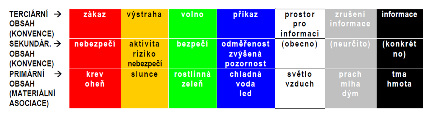 Jak funguje interpretace obsahu